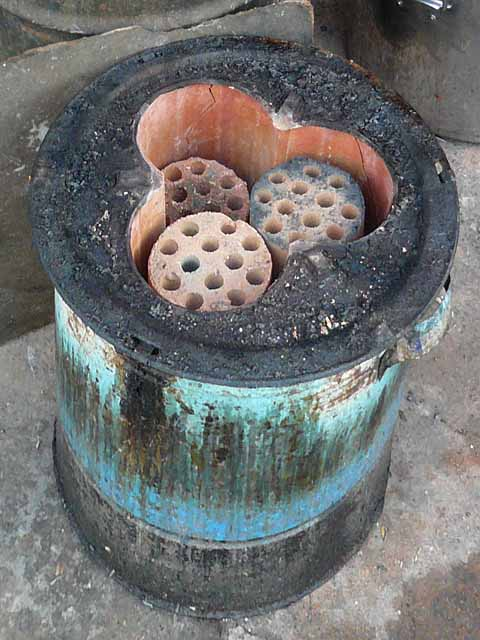 Traditioneller Ofen für die Wok Erwärmung mit 3 Röhren für Brennelemente, die hier zum Teil noch mit abgebrannter, geformter Asche gefüllt sind. Deutlich sichtbar die 3 Auflagestellen für den Wok (Jeweils am Schnittpunkt der Röhren).